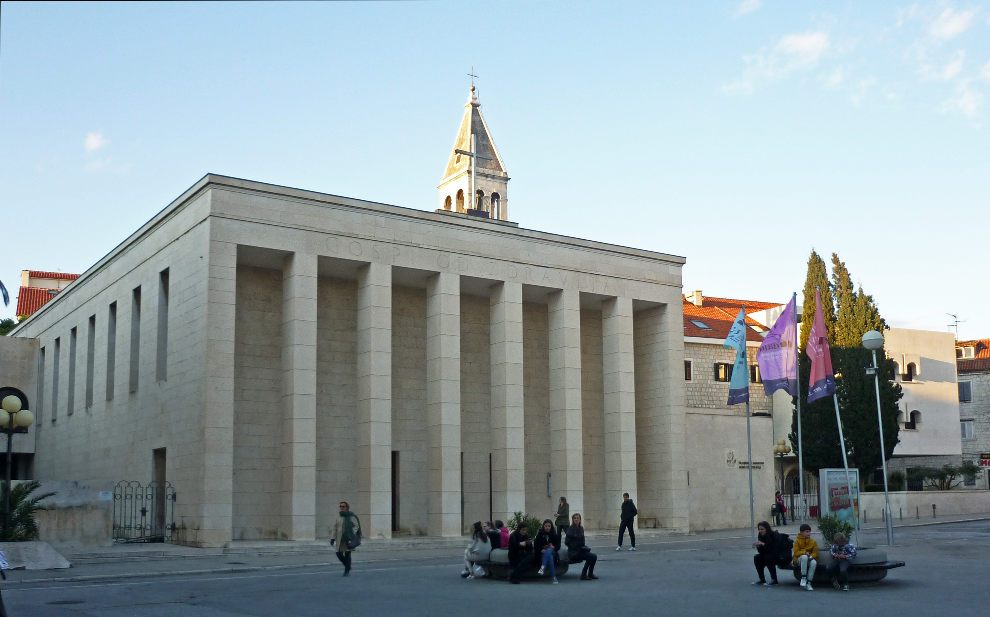 Kloster und Pfarrkirche Madonna della Salute (Mariahilf) (Franjevačko marijansko svetište - Samostan i Župa „Gospe od Zdravlja“) in Split-Dobri